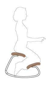 Проекционная схема посадки на стуле с опорой на колени.